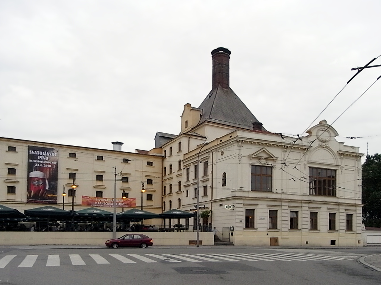 Brno, Pivovar Starobrno a zahrada